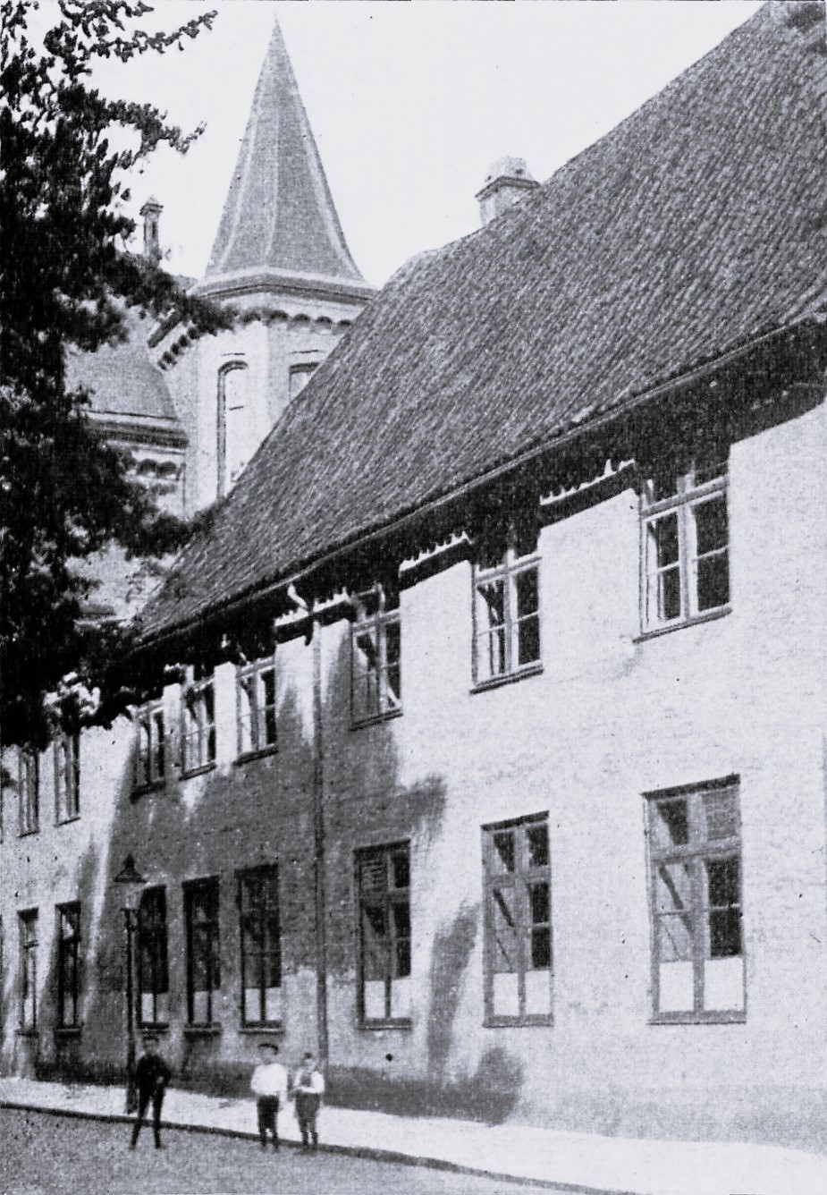 Ehemaliges Unterrichtslokal des Seminars: Alter Flügel der Realschule am Domkirchhof